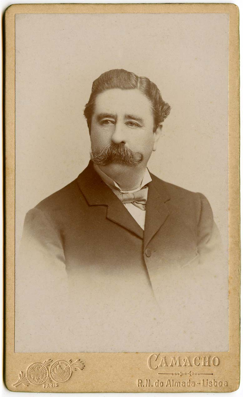 Descrição: Guilherme João Carlos Henriques Fonte: Familia Henriques Licença: Pertence à família que autoriza a sua utilização para mais informações contacte User:Guilherme Noronha